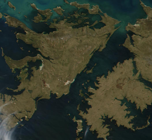 Fragment uit satellietkaart gebruikt op artikelen Falklandeilanden en Geografie van de Falklandeilanden.